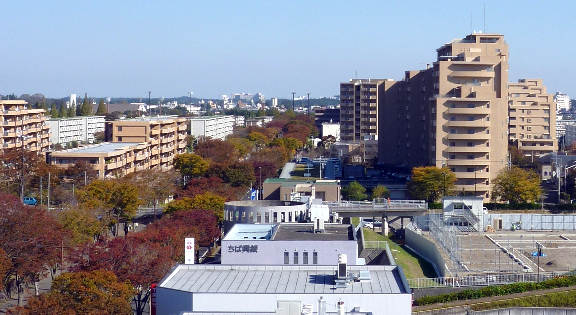 ボンベルタ成田店屋上から、成田駅方面への遠景